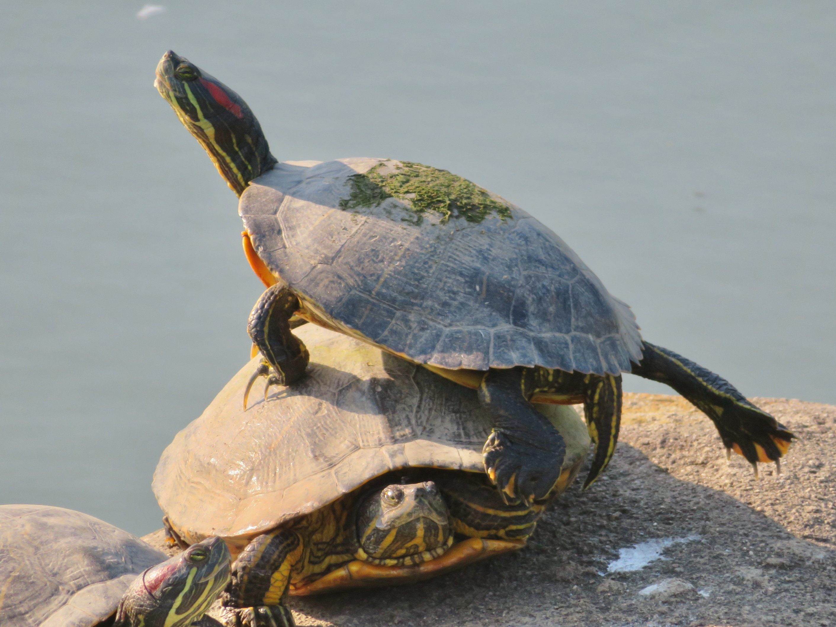 愛知県春日井市の落合公園の池にある石の上でバレリーナの様なポーズで日向ぼっこをするアカミミガメ。